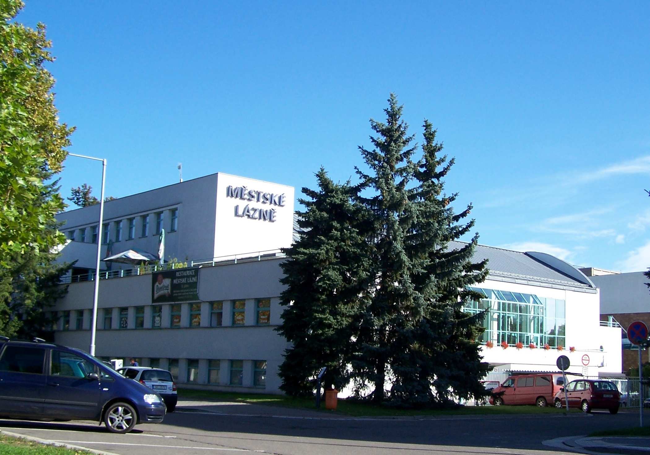 Městské lázně s bazénem (Hradec Králové), Eliščino nábř. 842/3, Hradec Králové